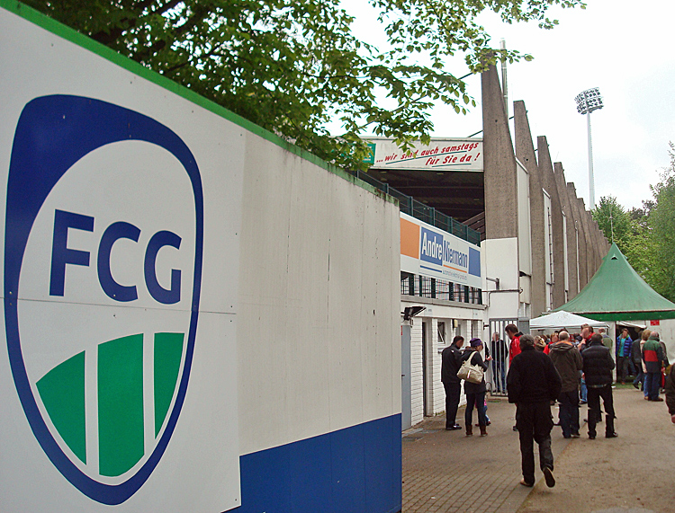 Heidewaldstadion Gütersloh, hinter der Sitzplatztribüne, im Vordergrund das Vereinswappen des FC Gütersloh